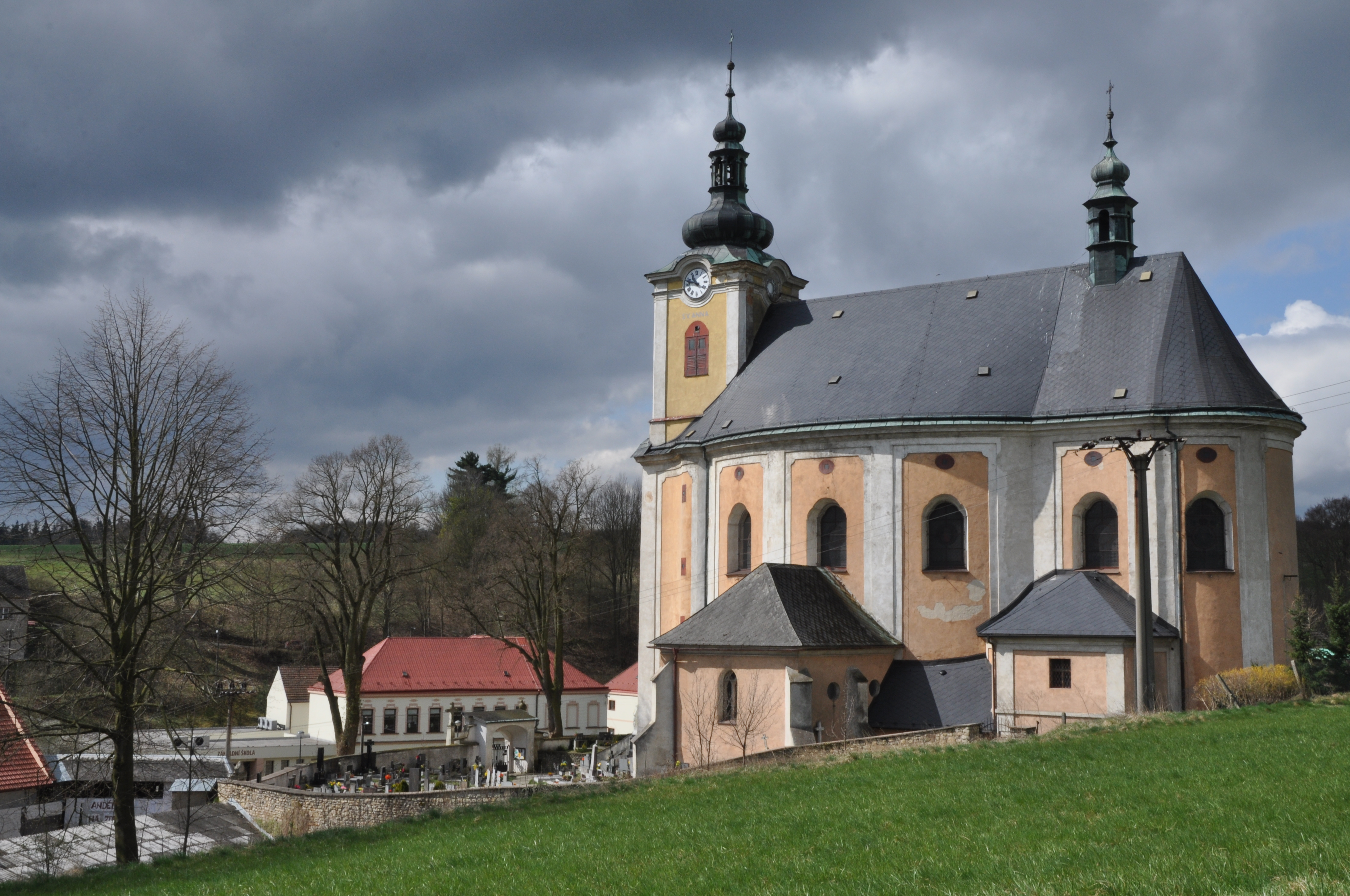 Pohled na kostel sv. Anny v Radiměři